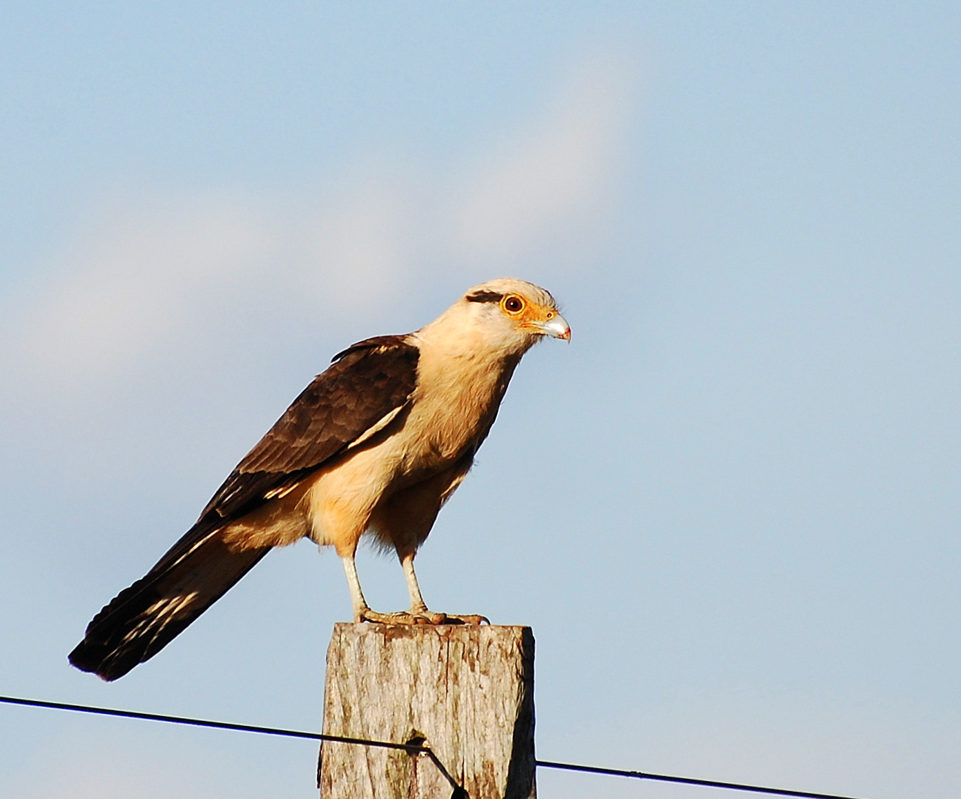 Rodovia Piraju / Cágado